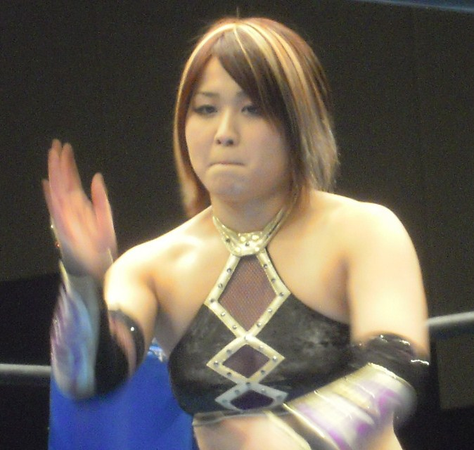 紫雷イオ 2010年12月26日アイスリボン後楽園ホール大会 投稿者撮影